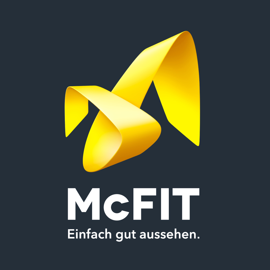 Logo der McFIT GmbH